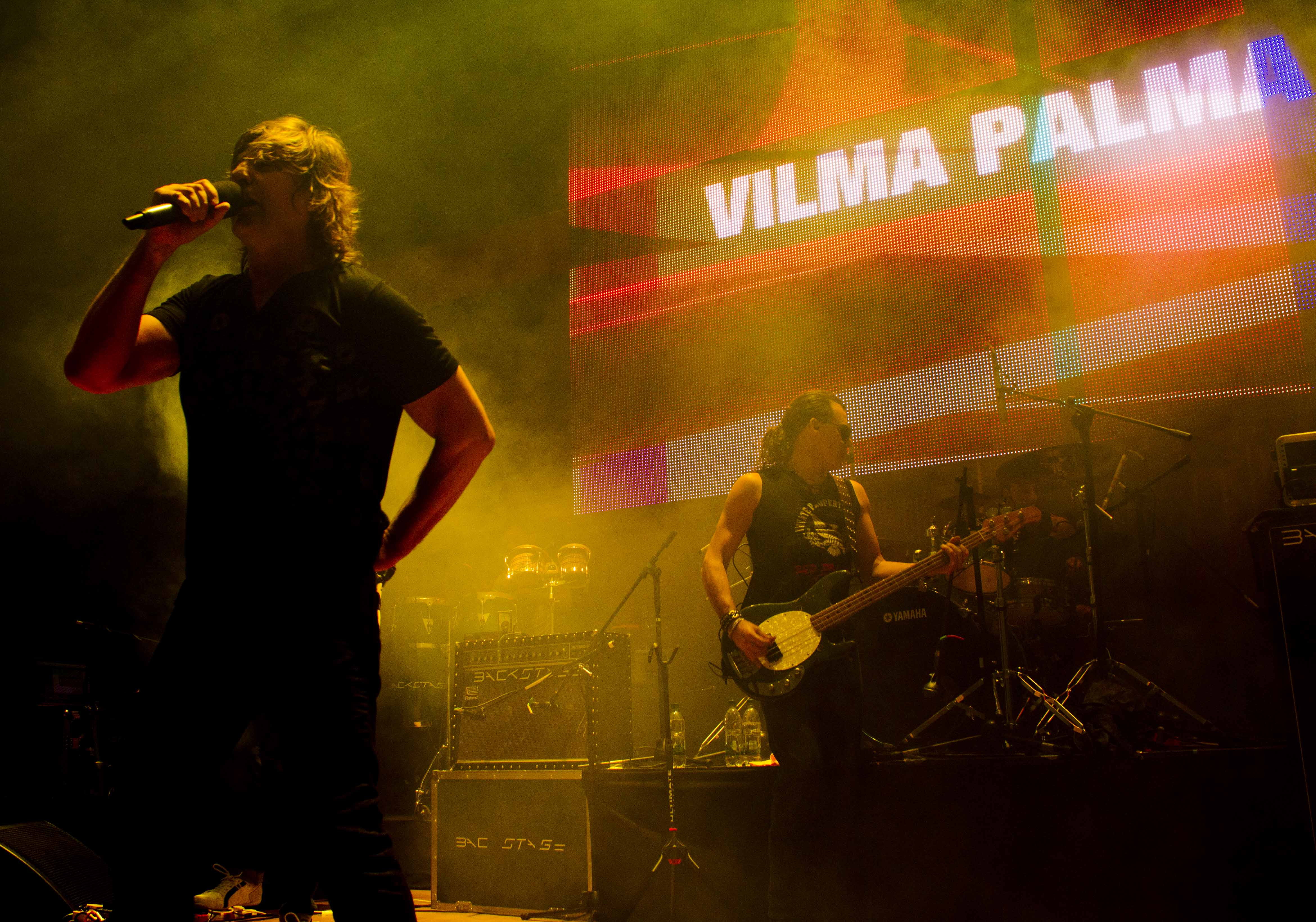 Vilma Palma e Vampiros en 2011.